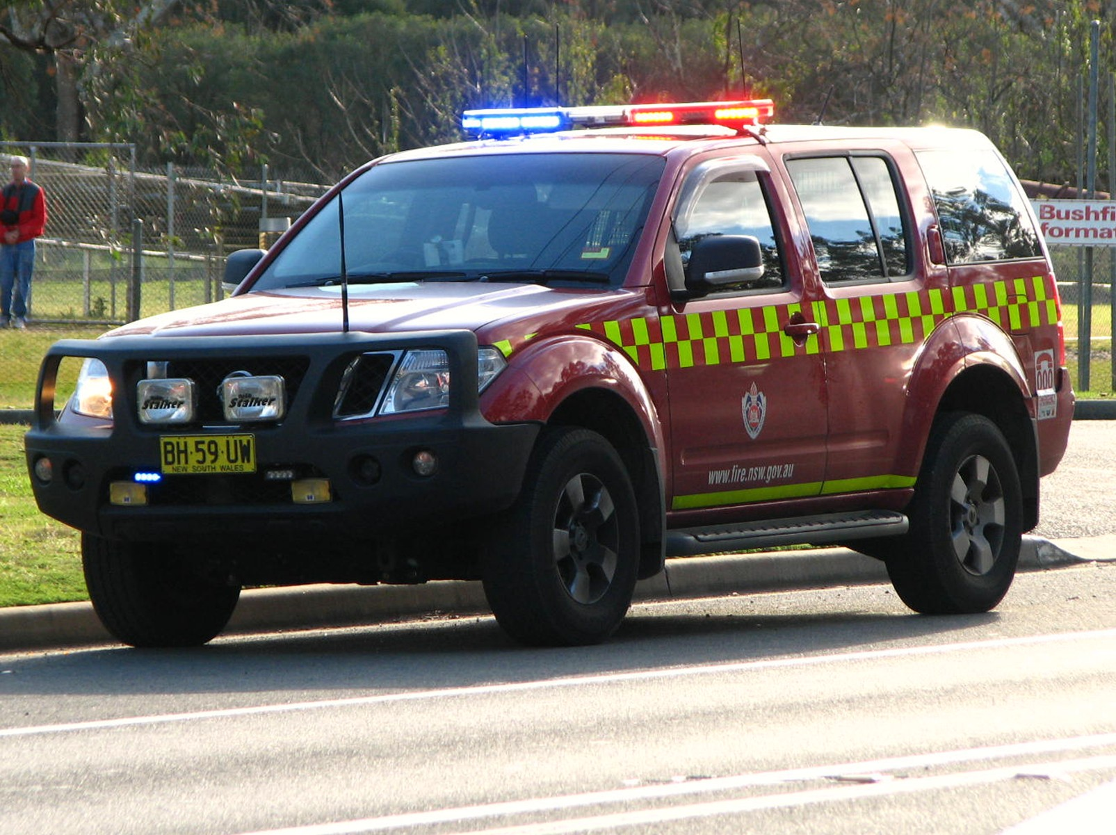 NSW Fire Rescue Nissan Pathfinder